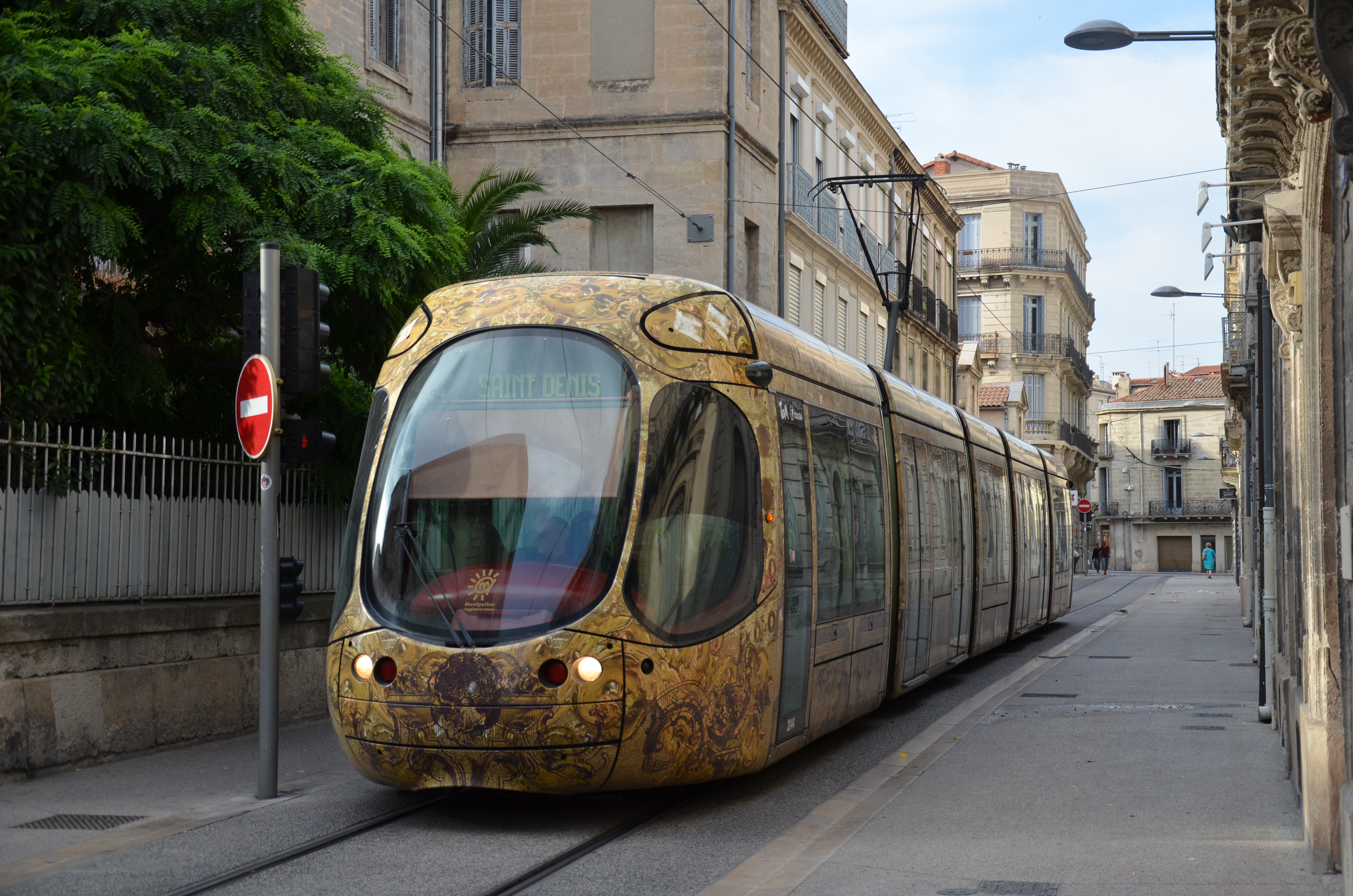 Alstom Citadis 302 n°2044 sur la ligne T4 du réseau TAM de Montpellier, près de la station Saint-Denis.